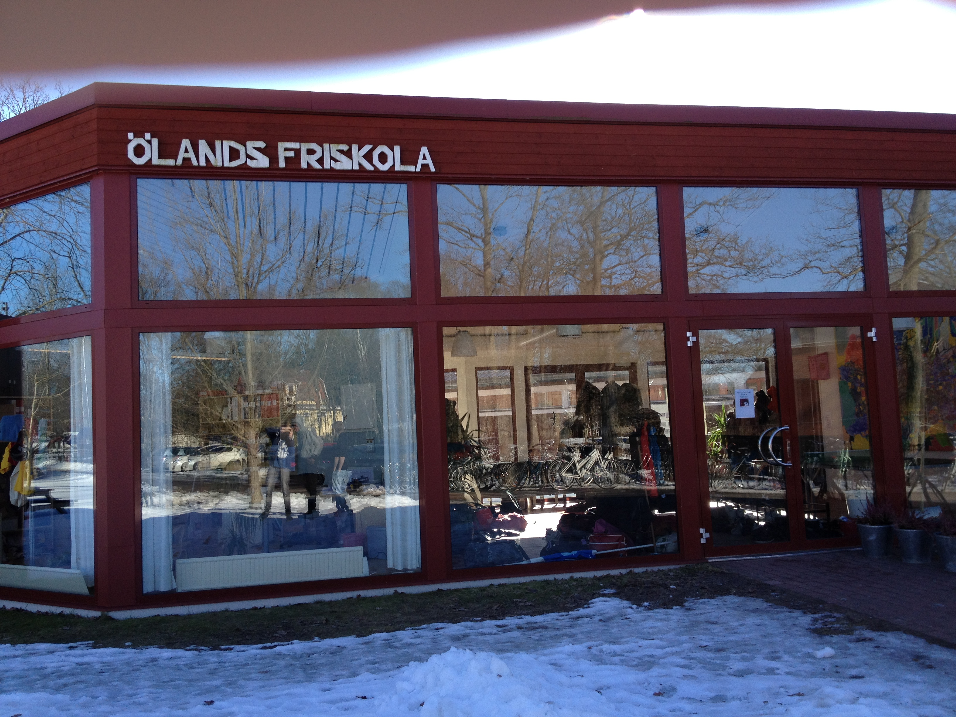 En bild på Ölands Friskola på Öland.